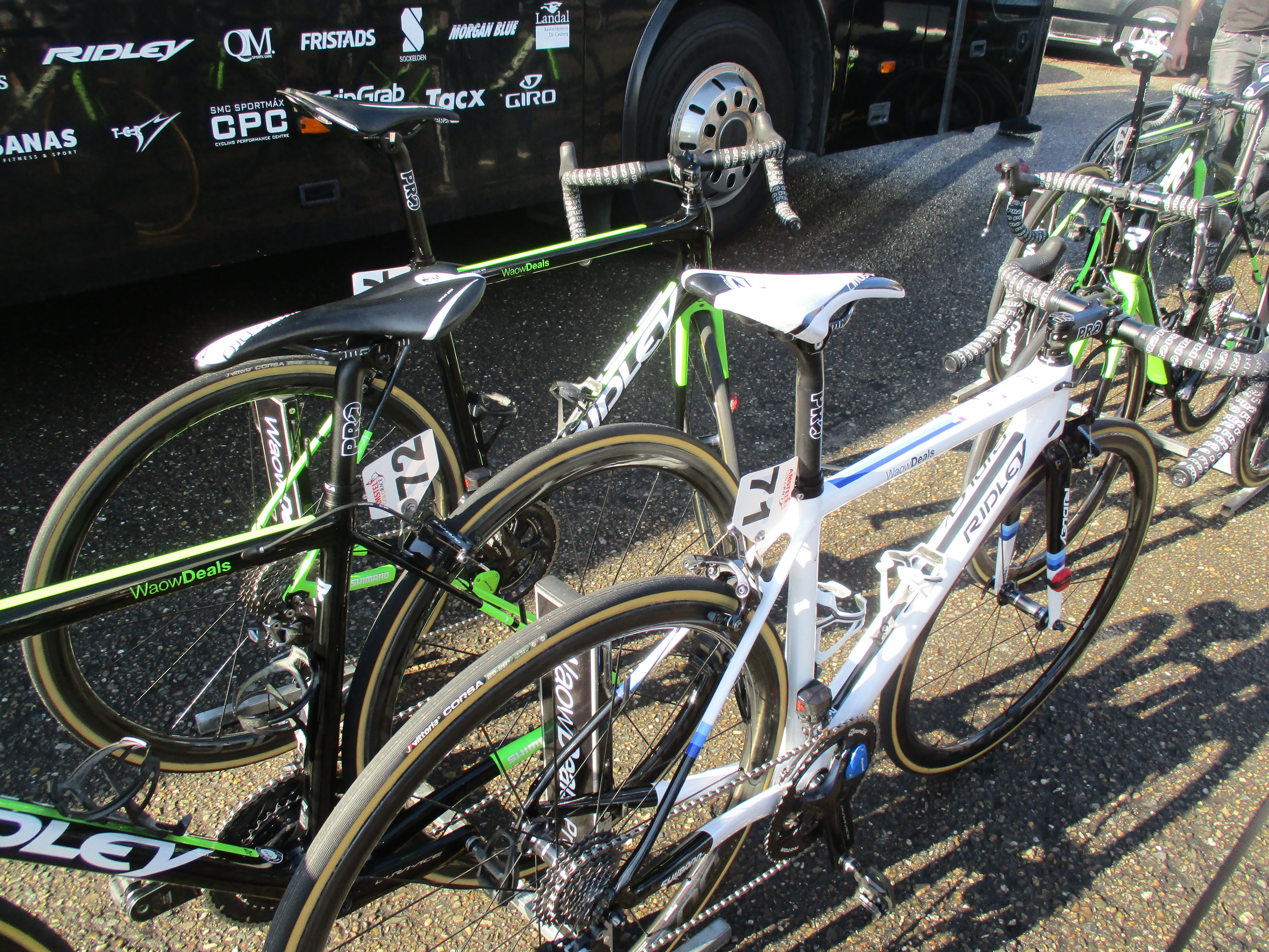 Start van de Amstel Gold Race Ladies Edition 2018 in Maastricht.